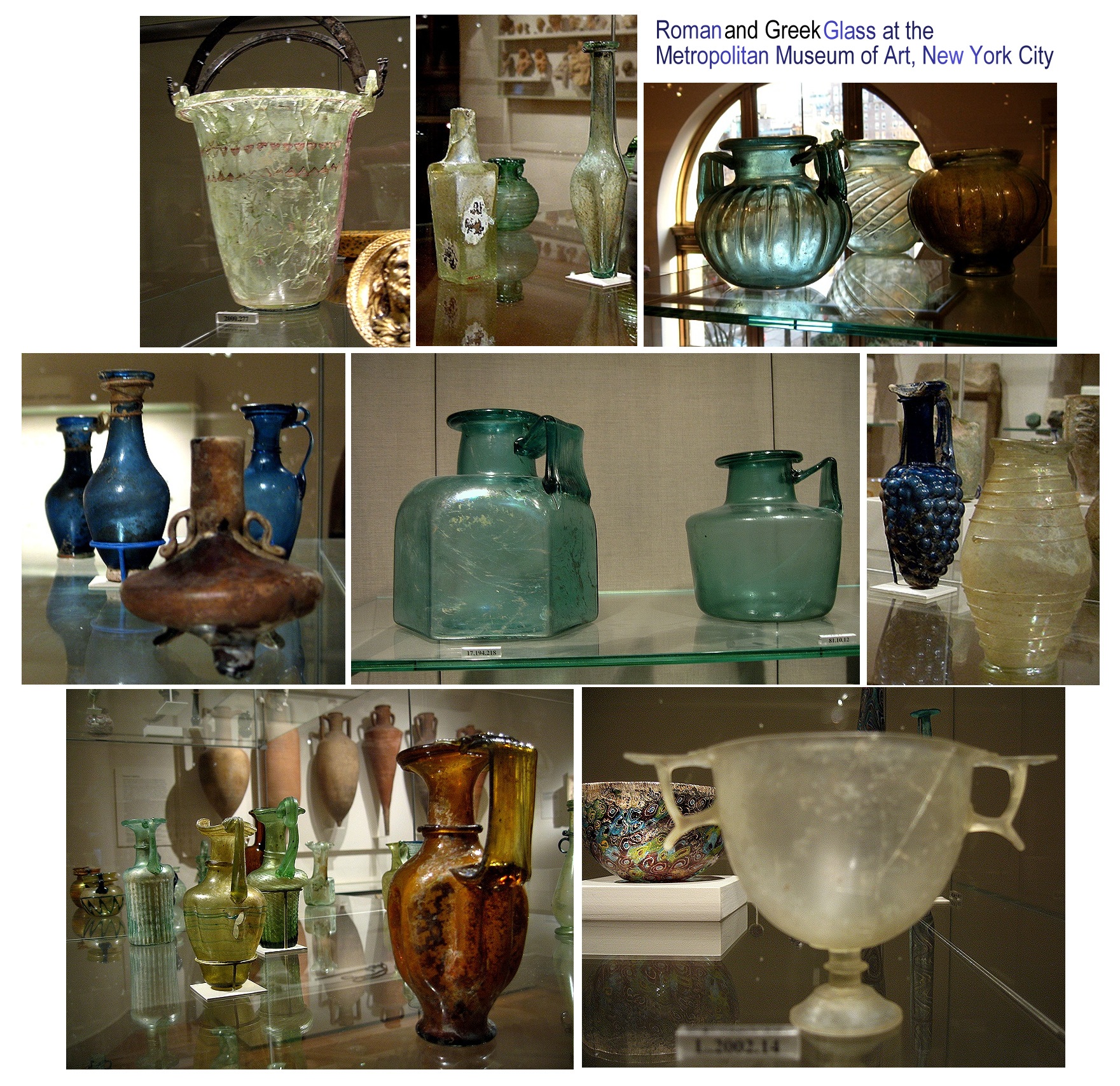 Roemisches und Griechisches Glass im Metropolitan Museum of Art, New York City